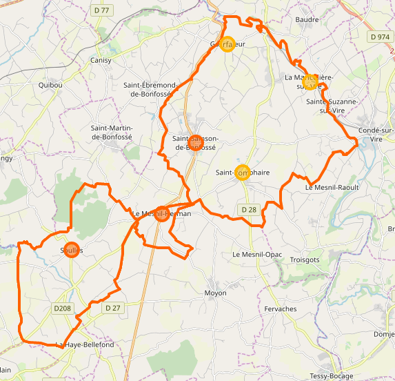 Carte de la commune nouvelle en 2019 et ses communes déléguées